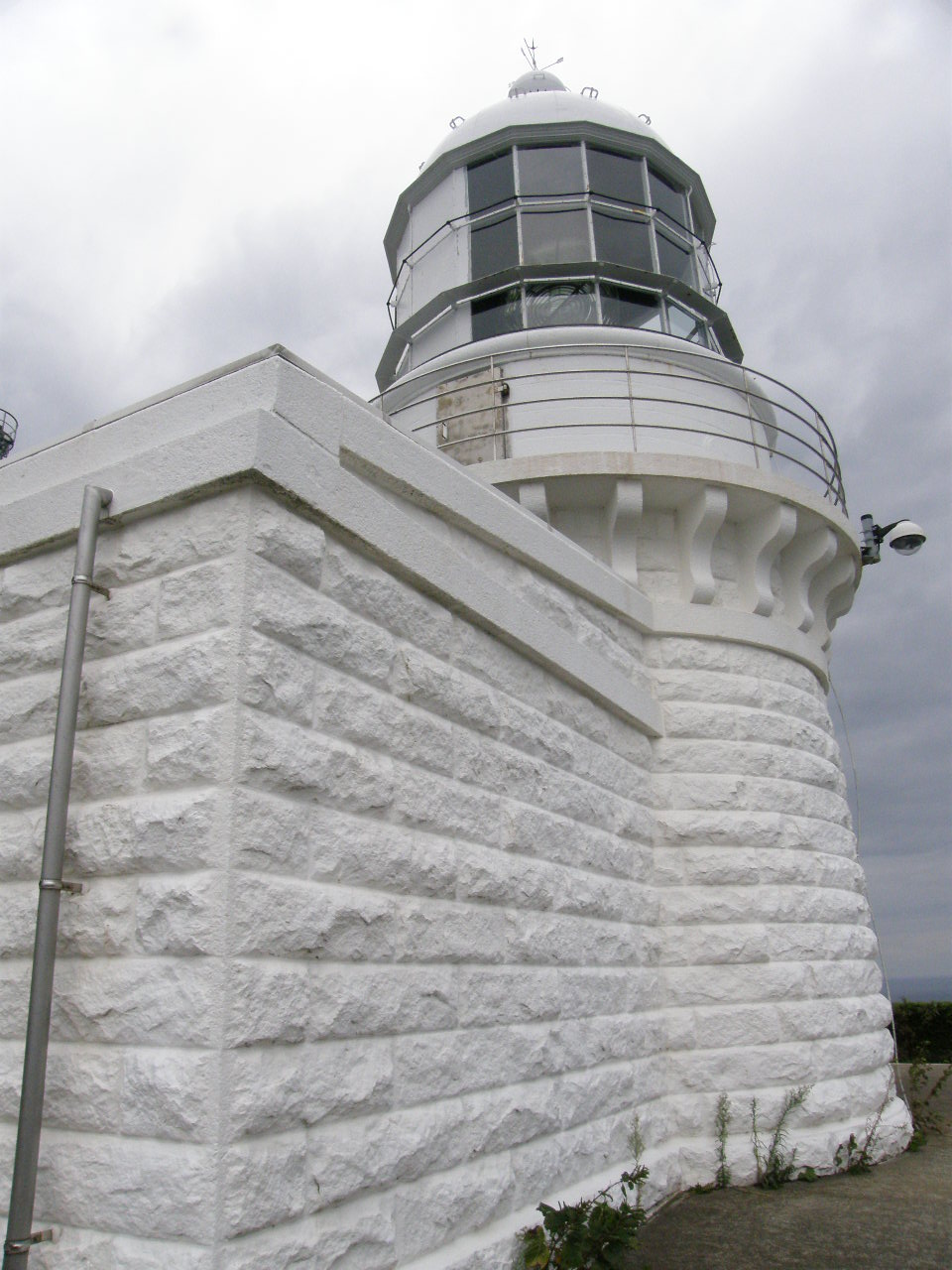 京丹後市丹後町 Kyougamisaki Lighthouse（経ヶ岬灯台） 2010-10-03